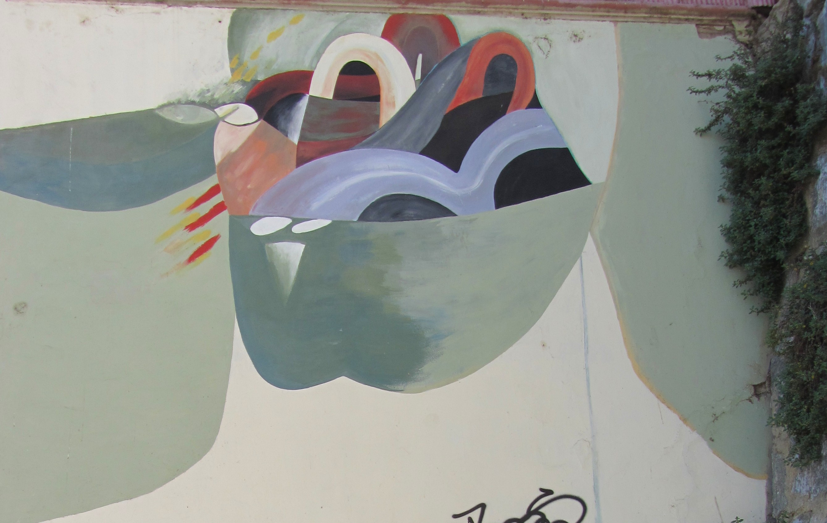 Mural nº9 del Museo a Cielo Abierto de Valparaíso, titulado El fantasma del ascensor (detalle), pintado en 1992 por Rodolfo Opazo